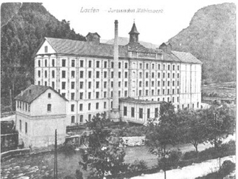 Birsmillgebäude anno 1901